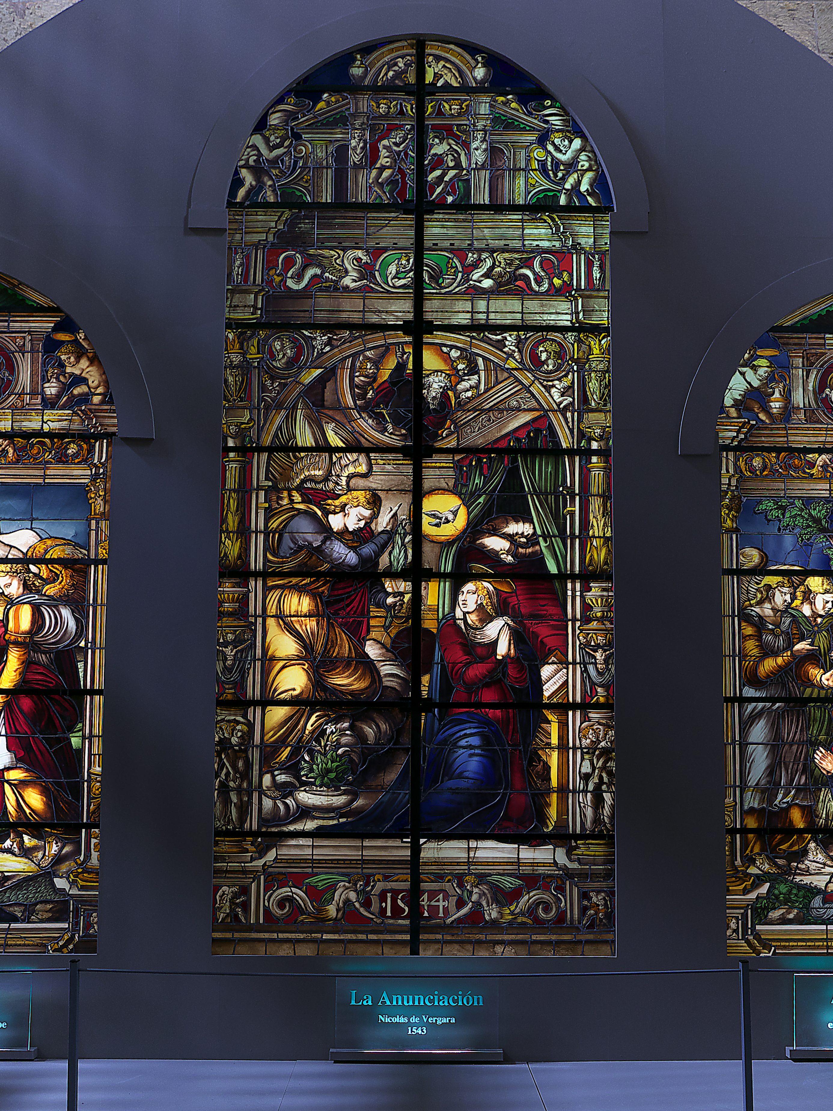 Anunciación. Nicolás de Vergara (1543). Primer tramo de la nave de la Epístola, Catedral de Segovia.